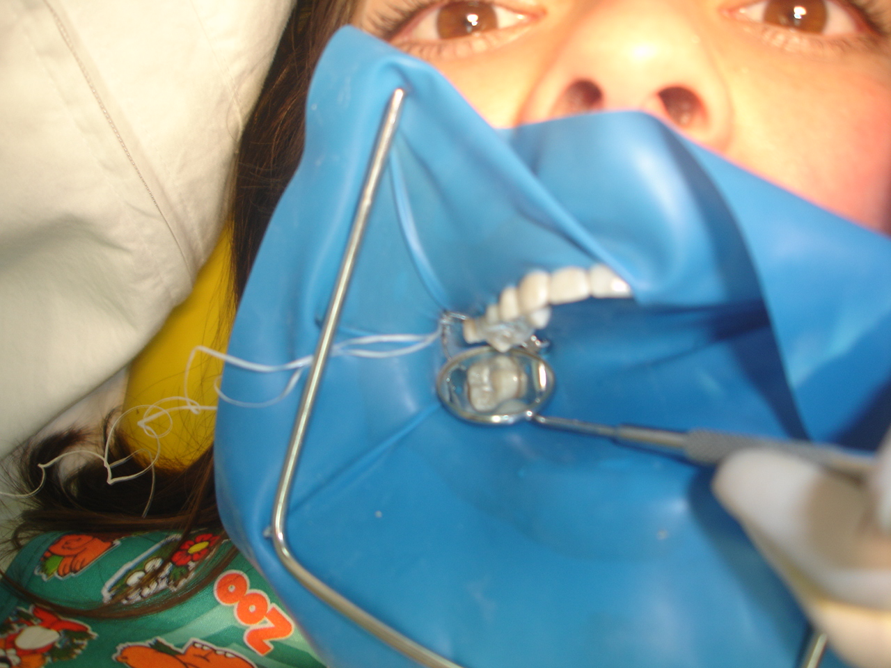 Aislamiento Dental realizado en la clinica de la facultad de Estomatología BUAP (2007).